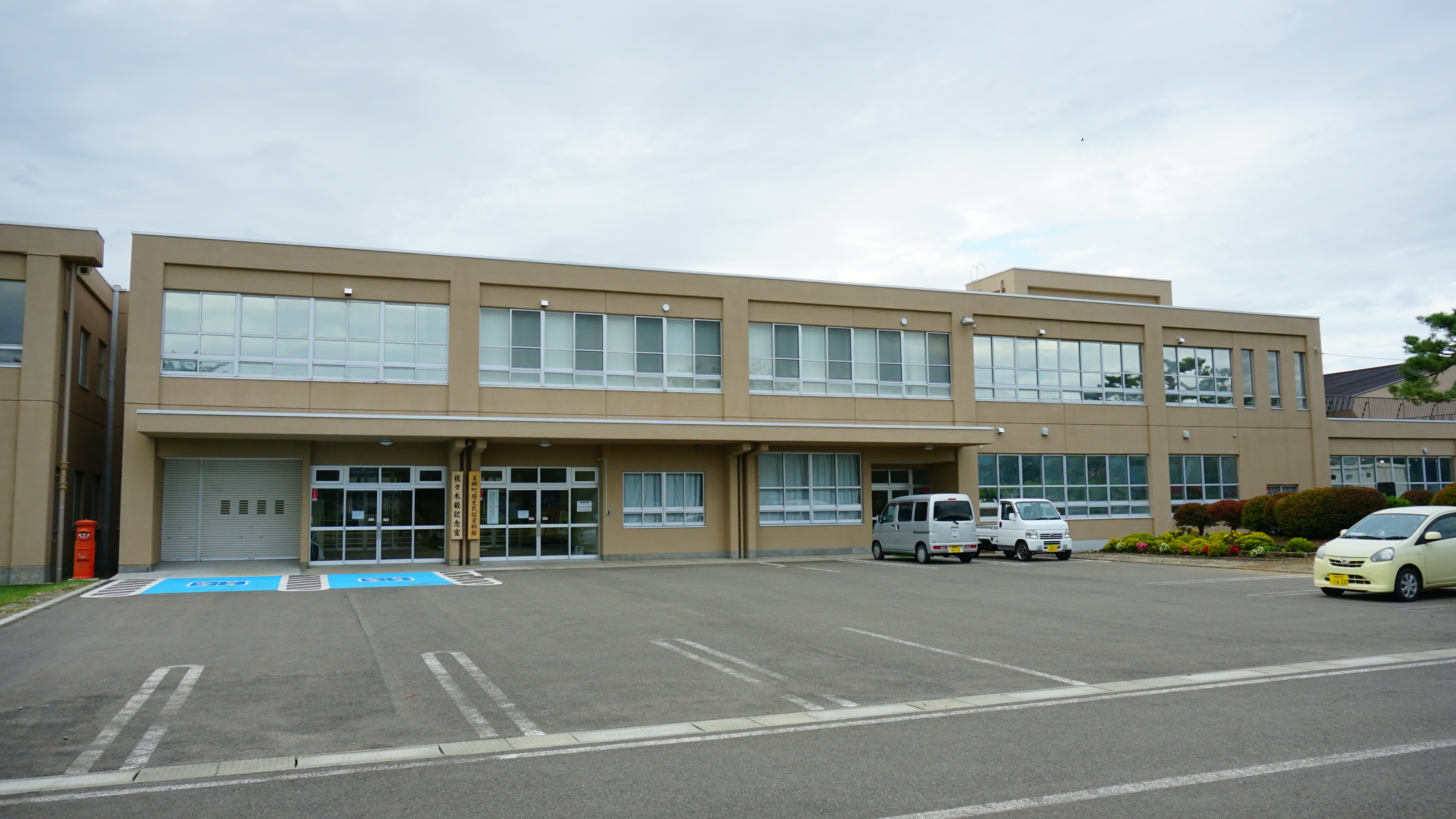 美郷町歴史民俗資料館・佐々木毅記念室